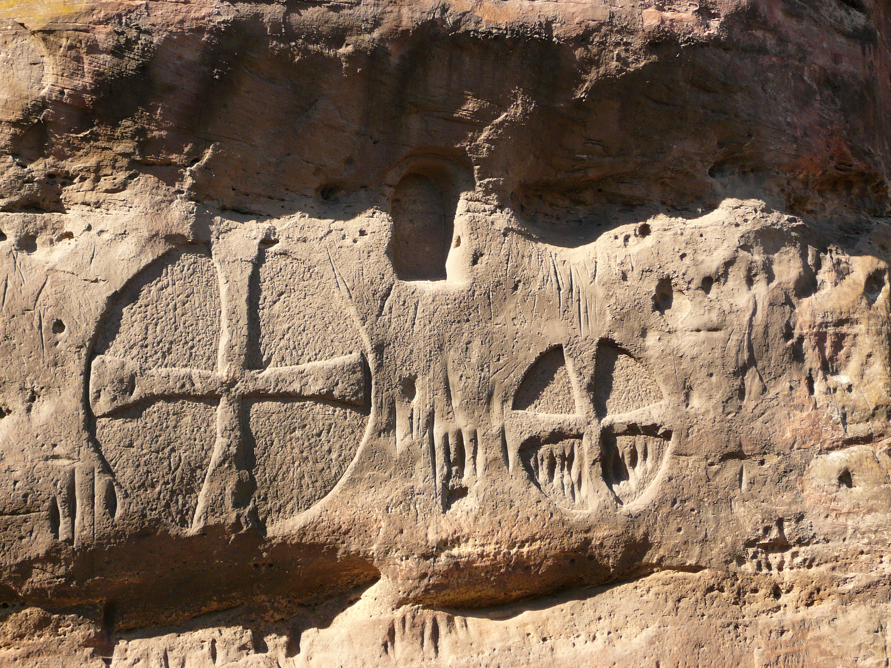 Mittelalterliche Scheibenkreuze am Bielstein in Reinhausen, Gemeinde Gleichen, Südniedersachsen. Daneben und darin Wetzrillen, darüber eine Nische zum Aufstellen von Heiligenbildnissen.